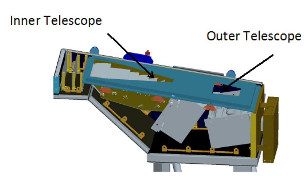 Parker Solar Probe Diagram instrument WISPR